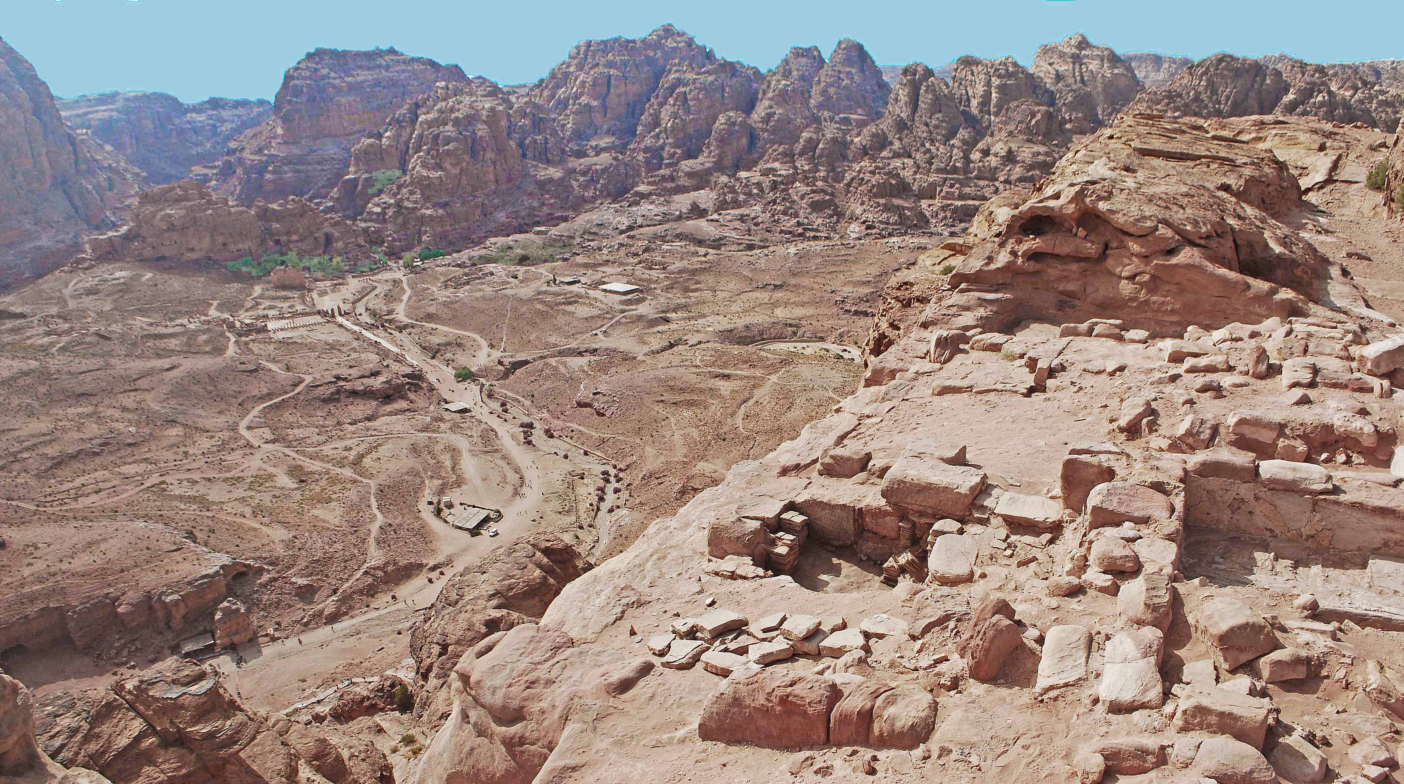 La cité de Pétra depuis les fouilles des thermes de Khubthah.